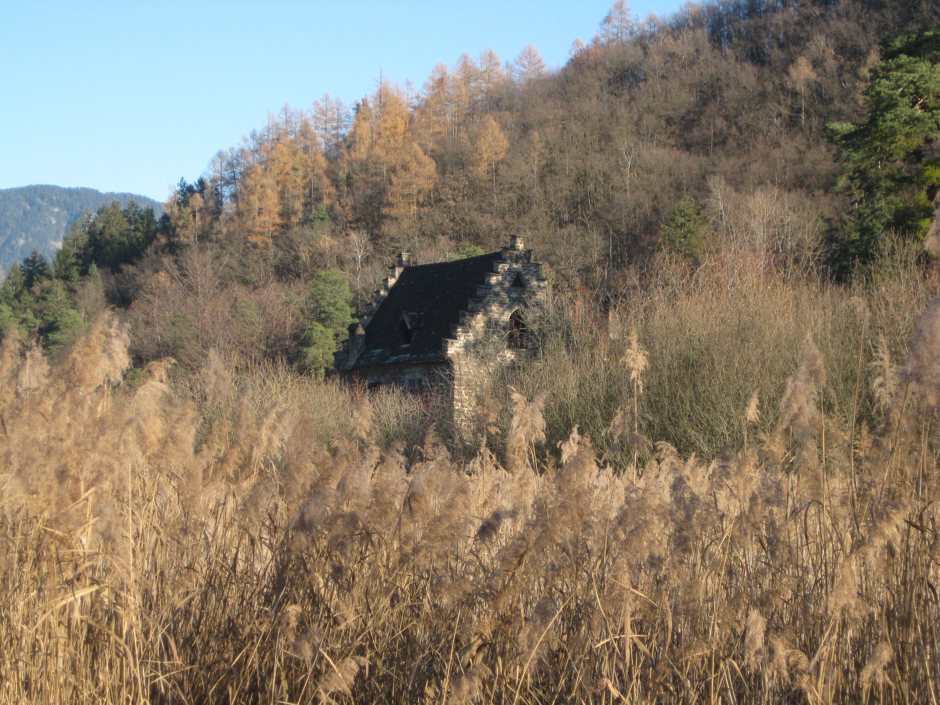 Das Montiggler Schlössl am Großen Montiggler See (Gemeinde Eppan) in Südtirol